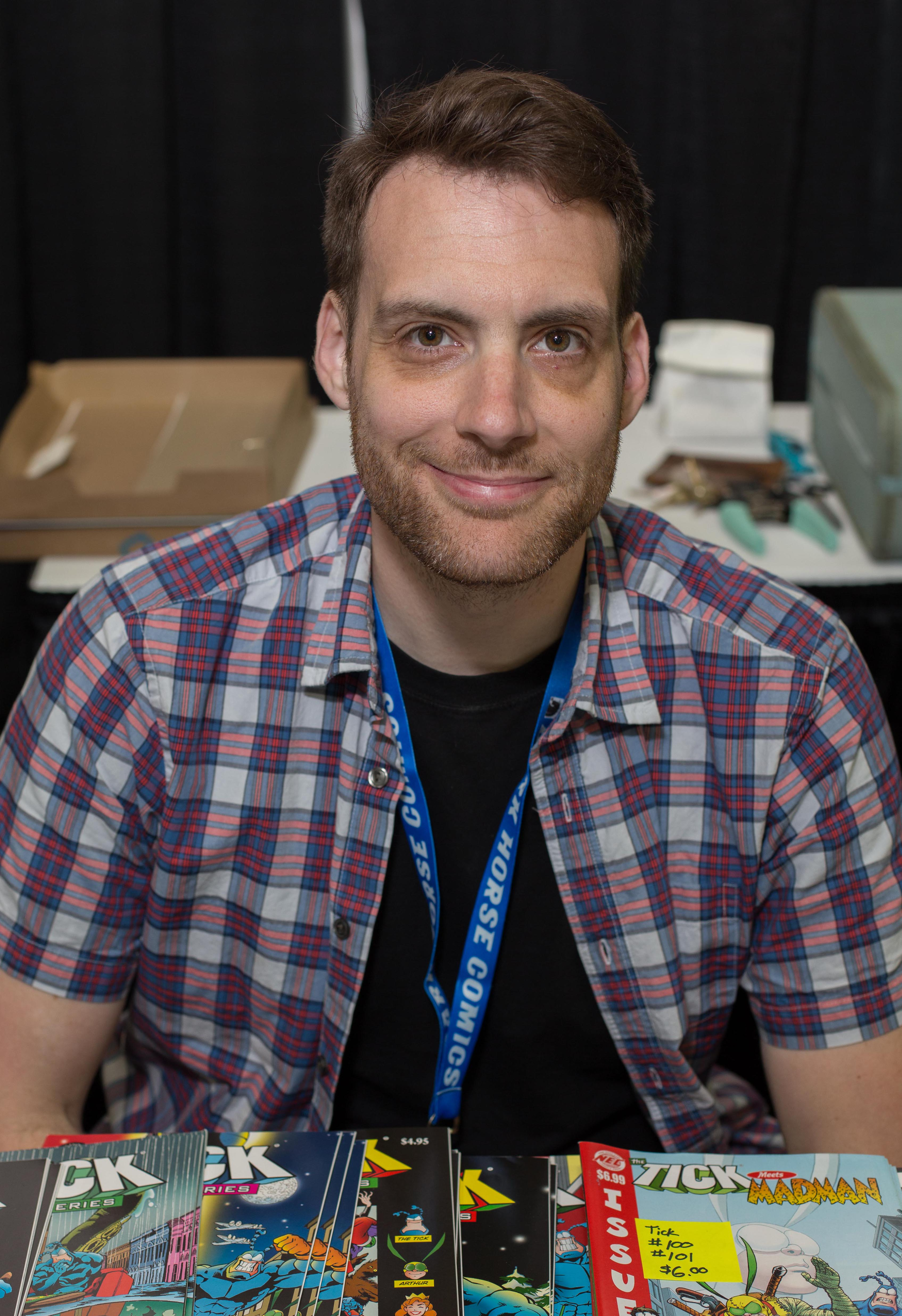 Les McClaine